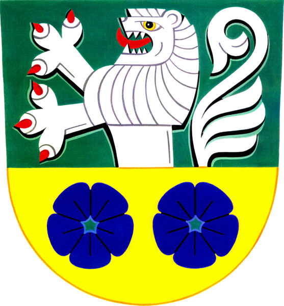 Znak obce Osíčko